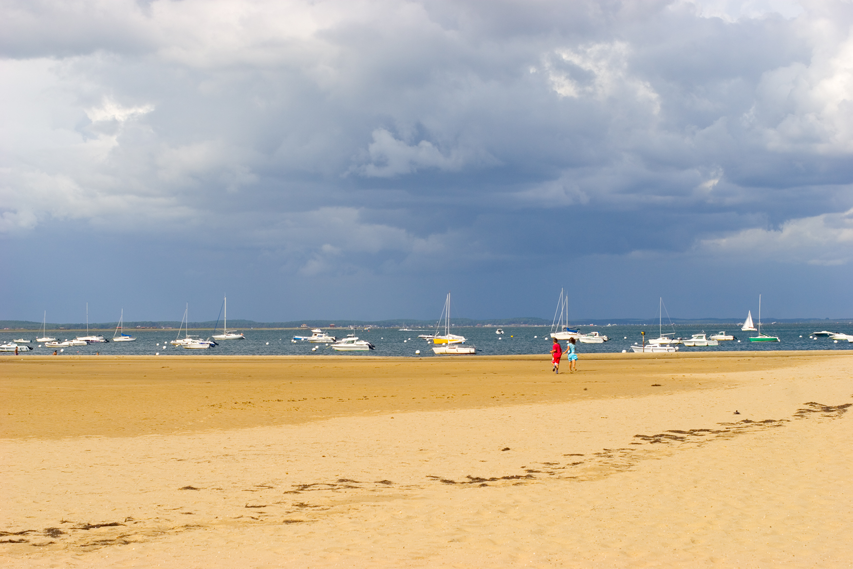 Plage d'Arcachon (Gironde, France).